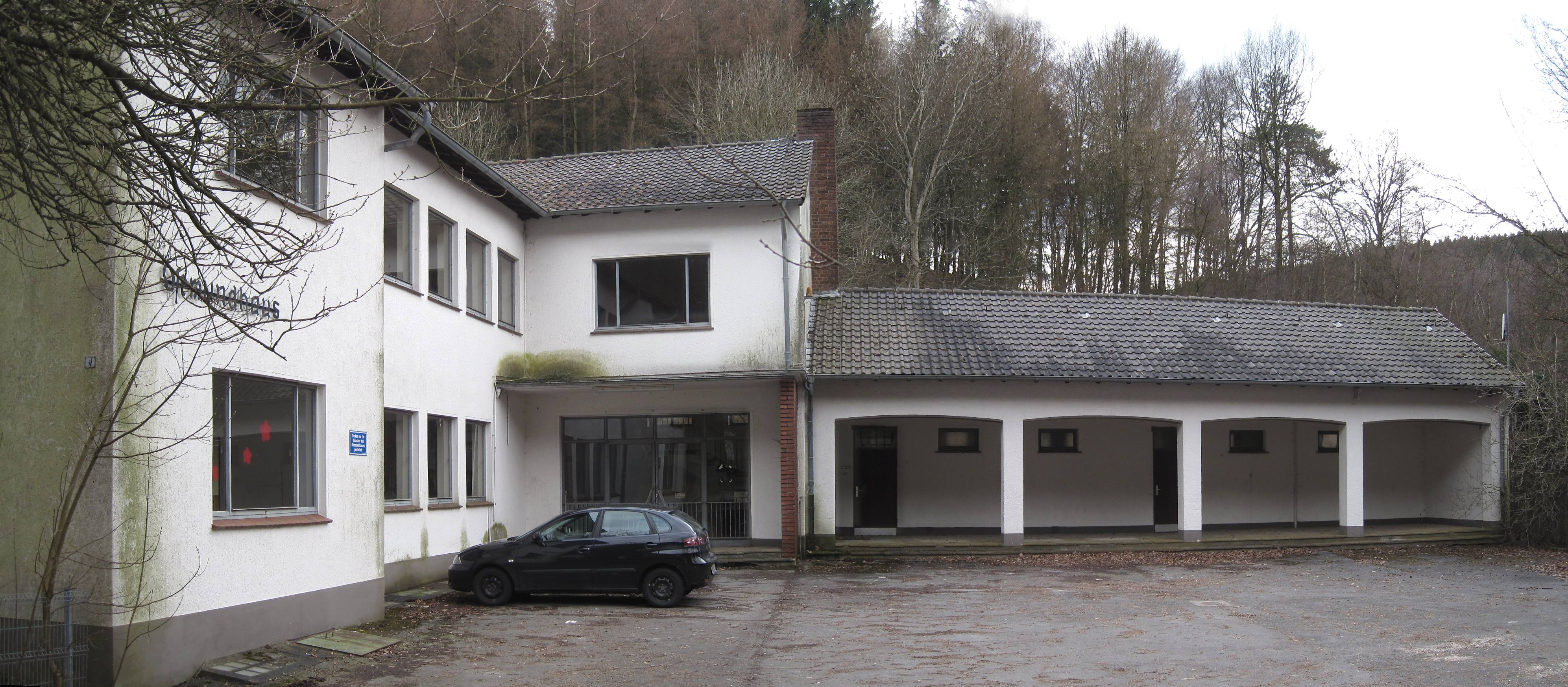 Osemundhaus in Hemer-Bredenbruch, Frönsberger Straße.